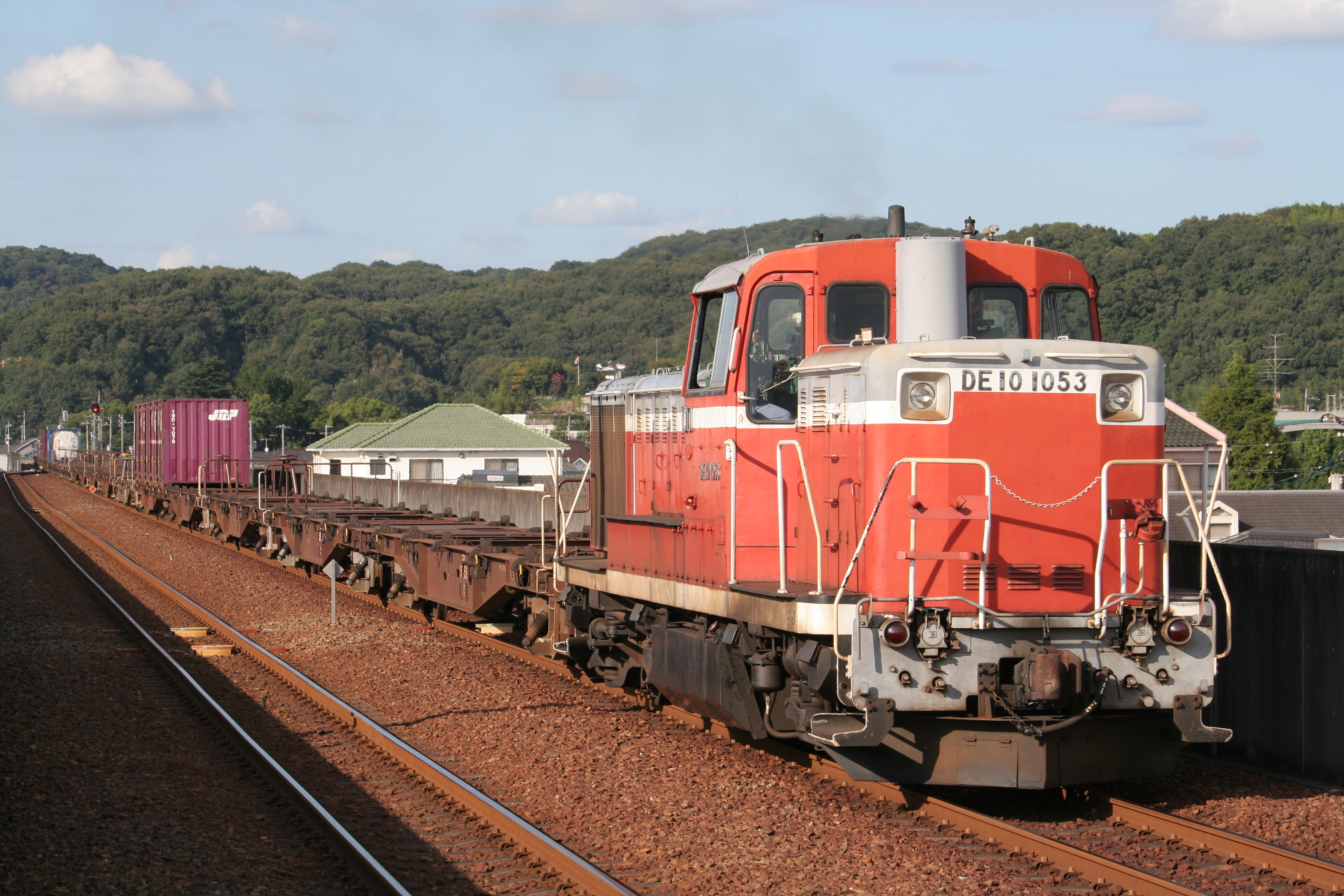 JR貨物DE10形ディーゼル機関車1053号機 水島臨海鉄道水島本線、弥生駅